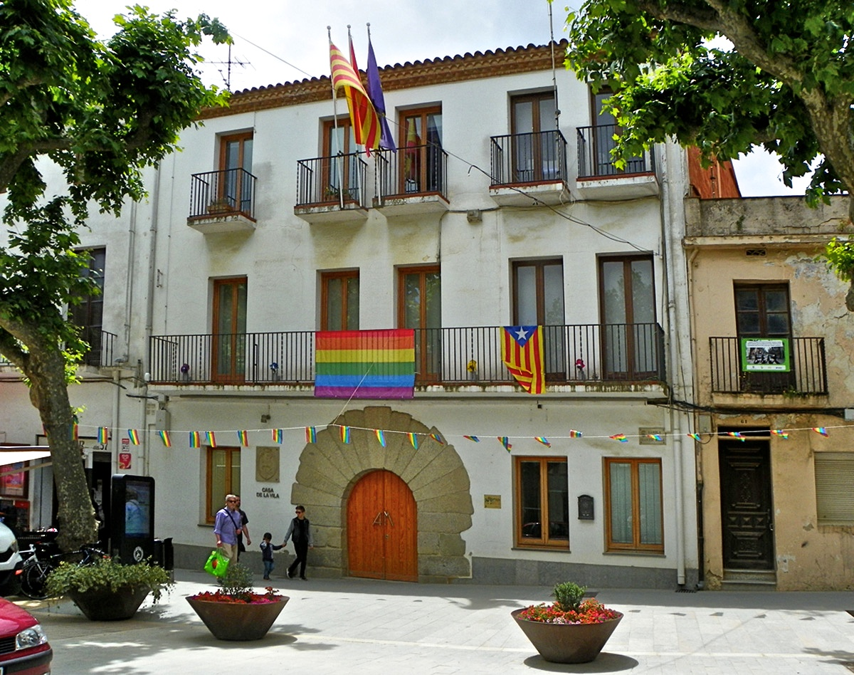 Façana de l'Ajuntament d'Arenys de Munt amb banderes irisades del moviment LGBT+.